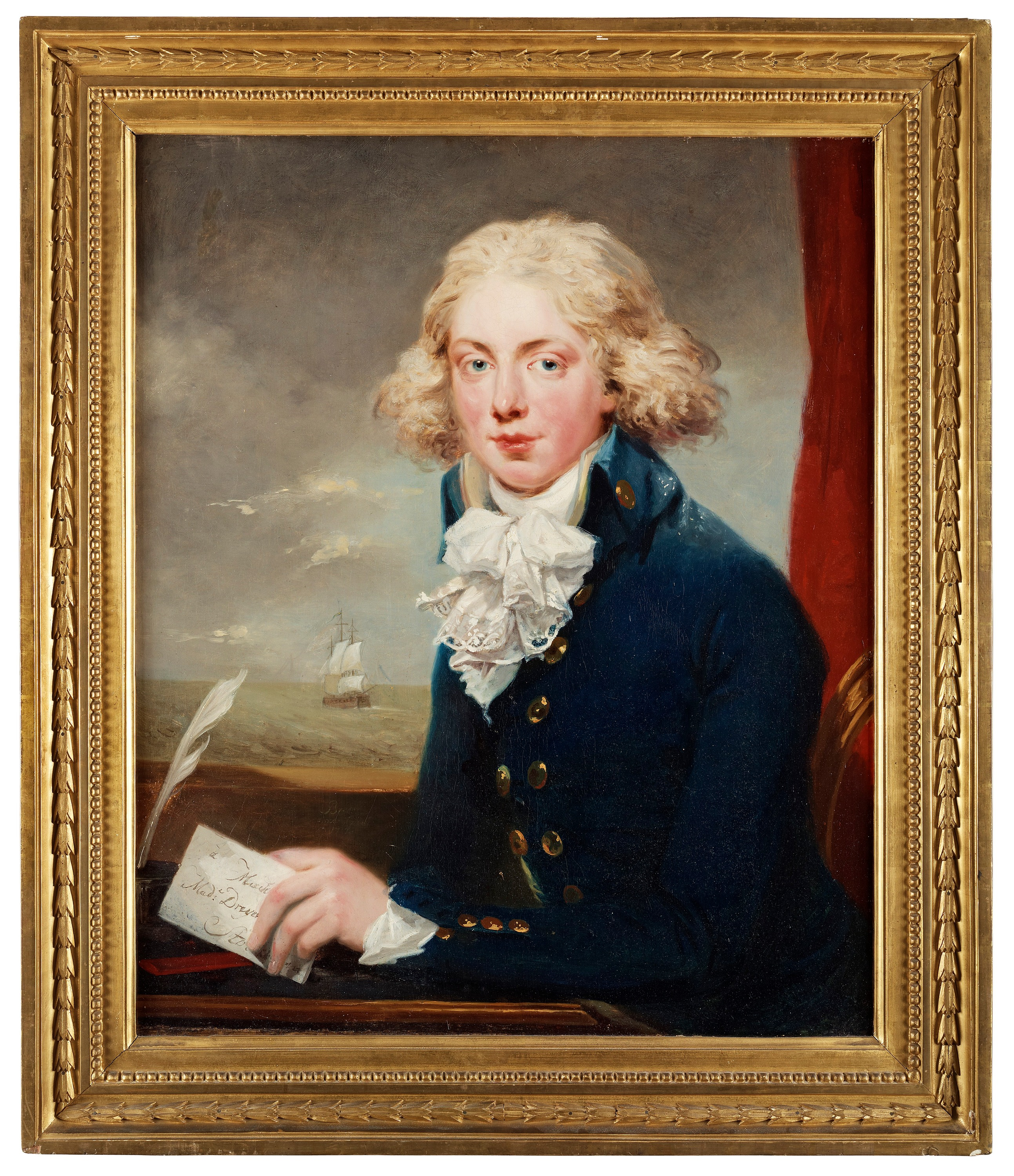 Carl Dreijer (1770-1802), avporträtterad av Carl Fredrik von Breda i London 1791.